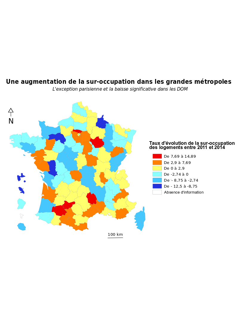 Paris a pris sa politique de logement à coeur, au même titre que les DOM TOM, les lieux où la sur-occpuation est la plus forte sont en baisse